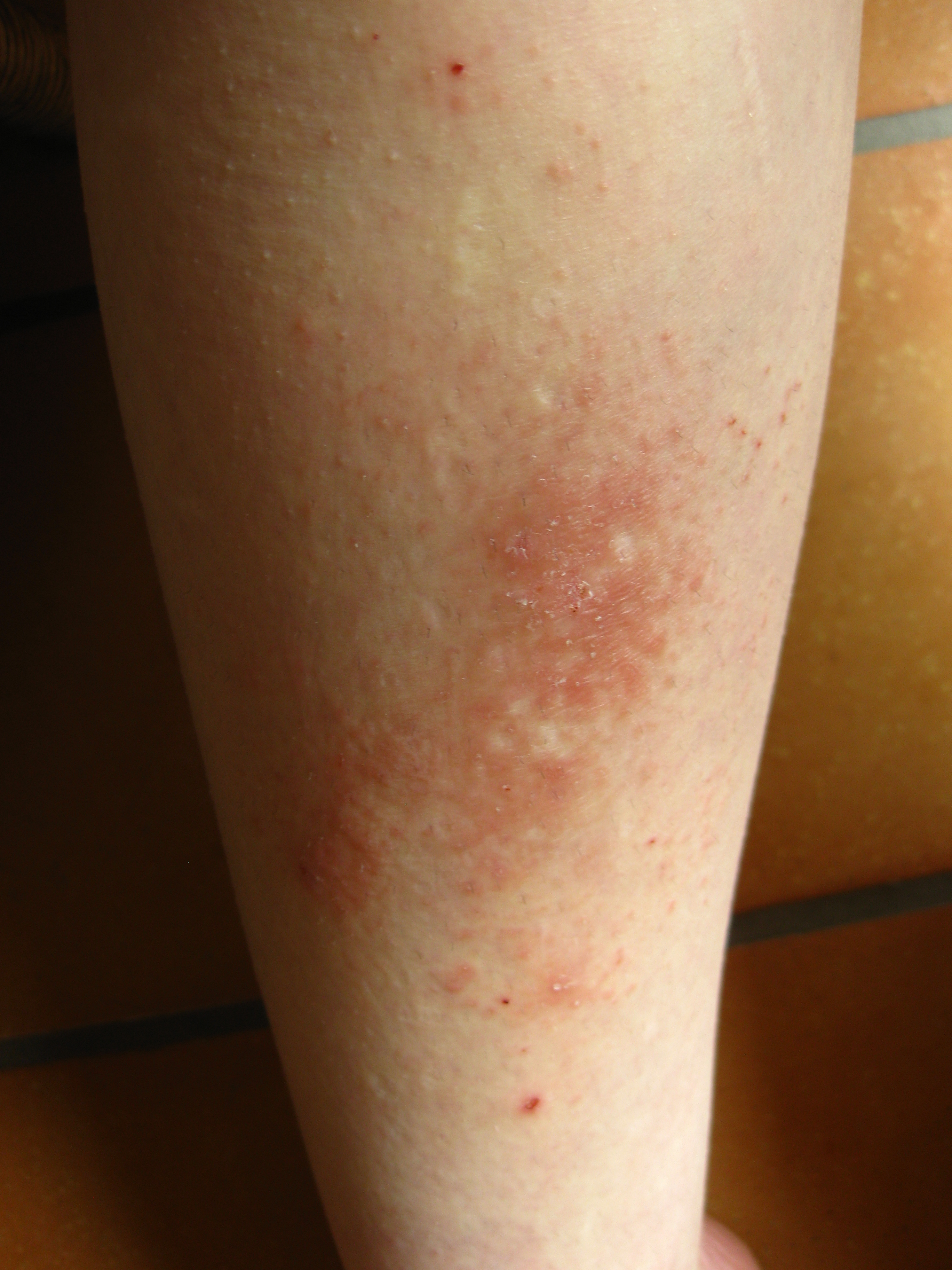 Rezidiv eines Lichen Simplex Chronicus am Schienbein, bestehend seit 3 Jahren.